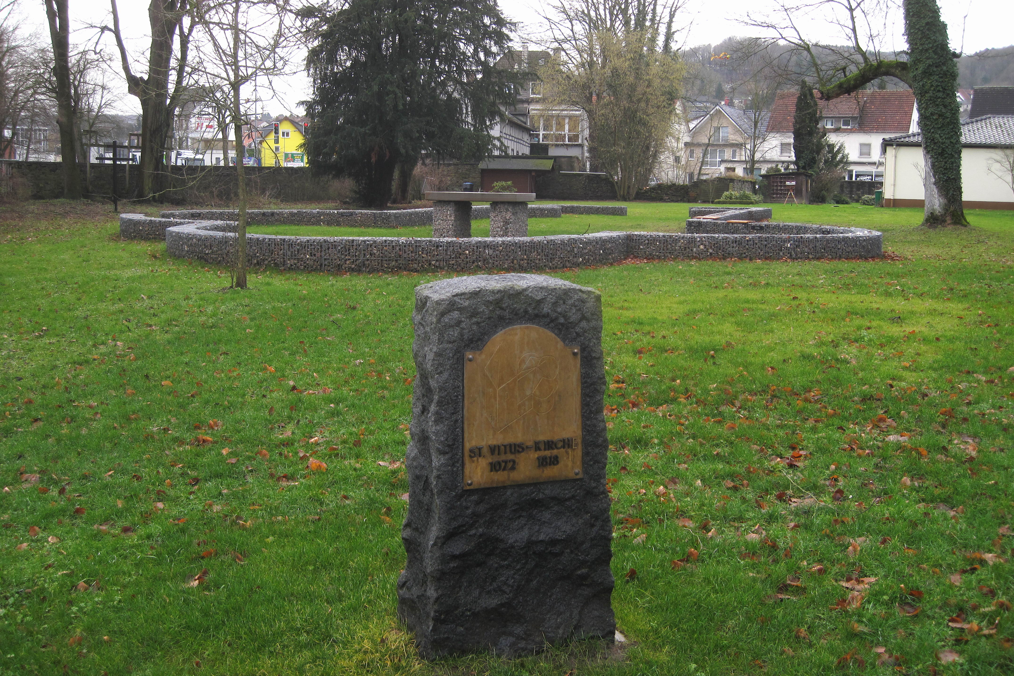 Nachbildung des Grundrisses der ehemaligen Vituskirche (1072-1818) im 12. Jahrhundert mit Gedenkstein aus dem Jahr 1975 in Hemer. Die Gravur auf der Messingplatte des Gedenksteines wurde durch den Hemeraner Künstler Adolf Krummel ausgeführt.